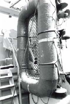 Carley-pelastuslautta pelasturisteilijä Harmajalla